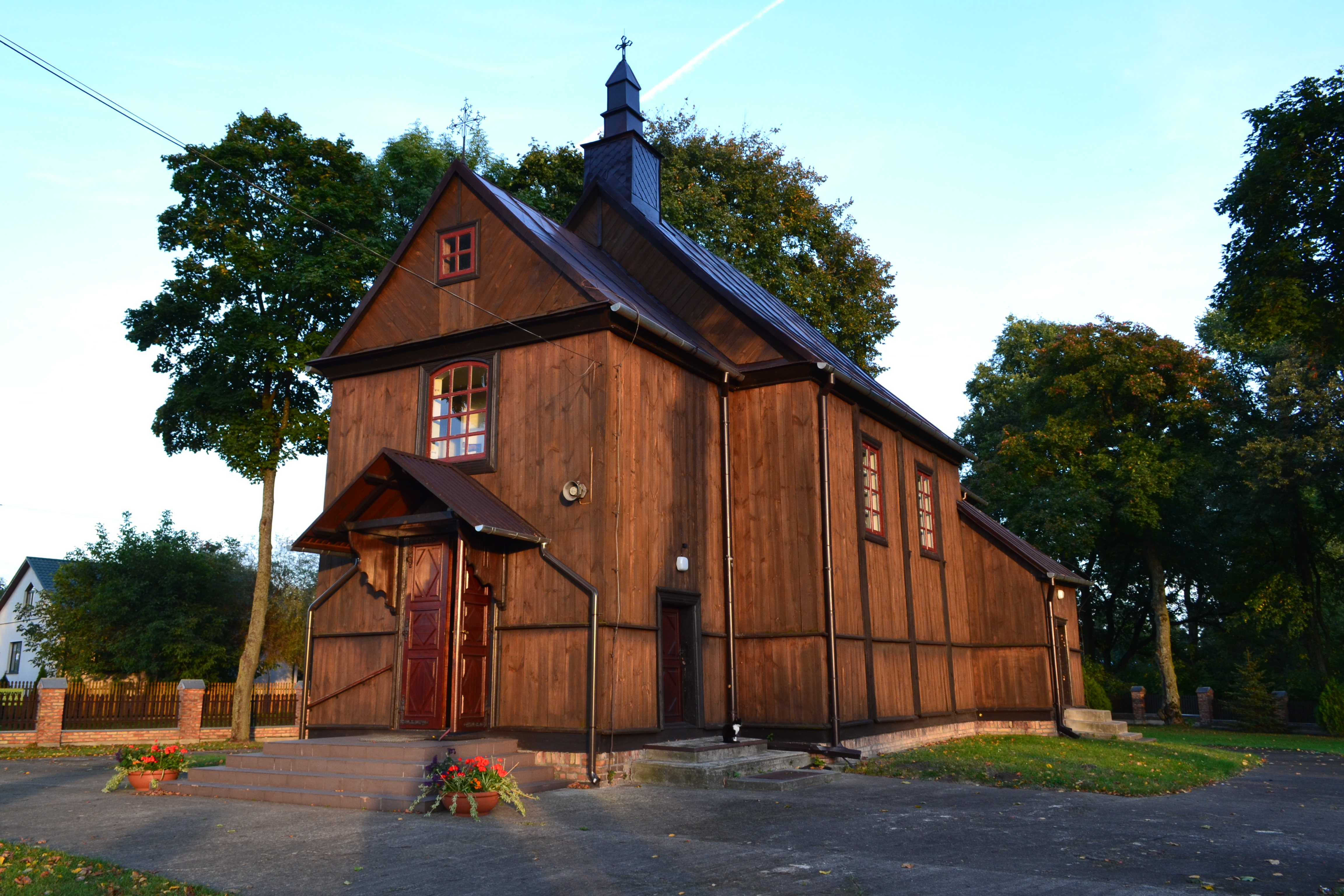 Witulin, kościół par. p.w. św. Michała Archanioła, XVIII